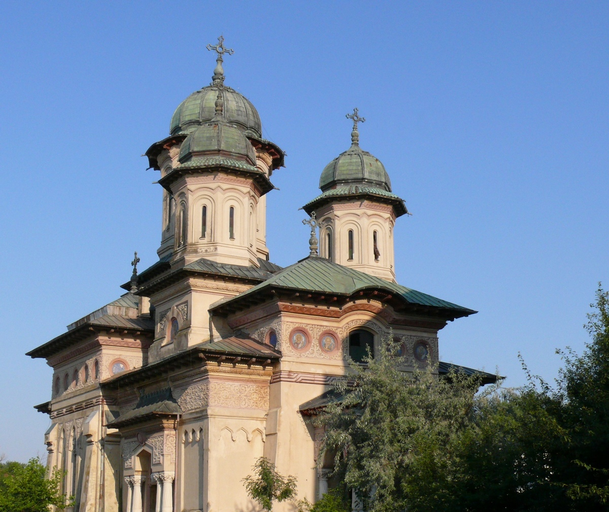 Catedrala ortodoxă "Sf. Nicolae și Alexandru"